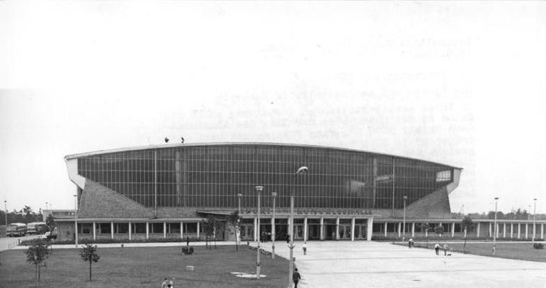 Schwerin, Sport- und Kongresshalle Zentralbild Kohls 15.9.1964 15. Jahrestag der DDR Die Sport- und Kongresshalle in Schwerin In ihrer architektonischen Gestaltung zählt die Halle zu den modernsten der DDR. Das Aluminiumdach umfasst 5600 m². Vier Pfeiler und zwei Querträger zu je 80 t tragen die Halle. Das Gesamtgewicht der Stahlkonstruktion mit seiner Verglasung beträgt 500 t. Bei Bühnen- und Boxveranstaltungen finden 8000 Zuschauer Platz. Bei anderen Sportveranstaltungen wie Hallenhandball oder Leichtathletik sind es 6000 Plätze. Die letzten sportlichen Höhepunkte erlebte dieser hochmoderne Bau bei den Olympia-Ausscheidungeskämpfen im Boxen und Turnen (Frauen).